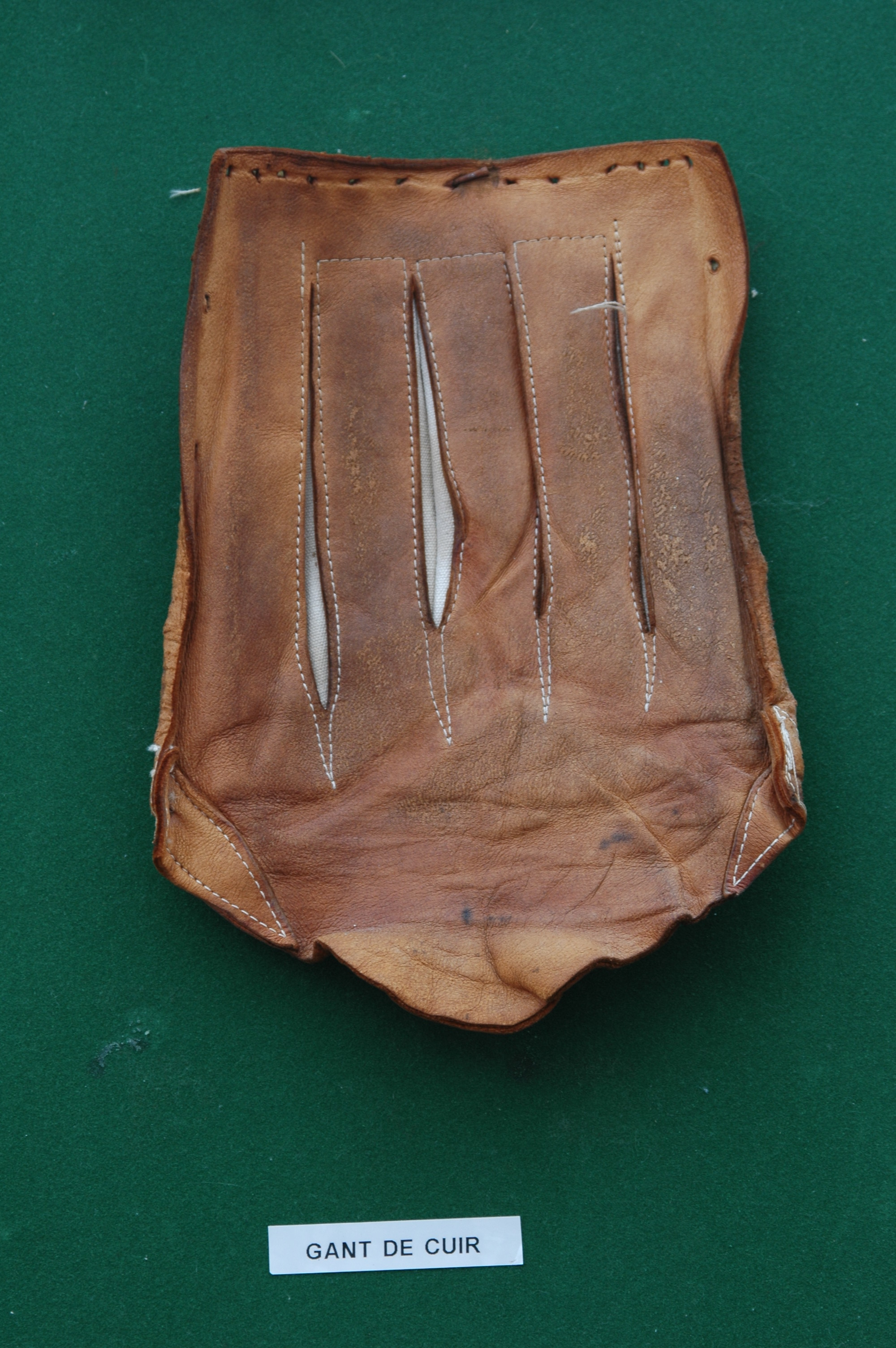 Grand chistera, le gant. Photo prise le 01/08/06 par Harrieta171